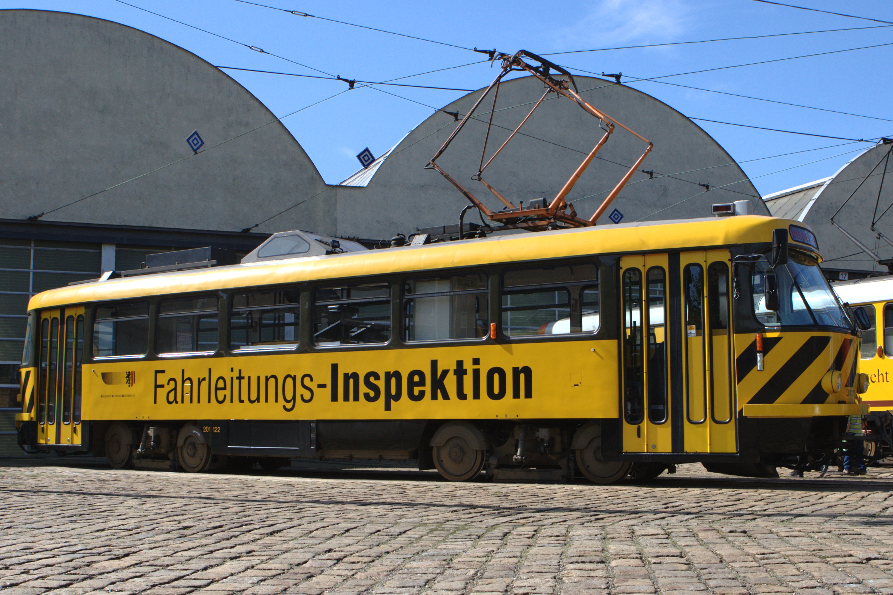 Fahrleitungsinspektion DVB AG in Dresden Tolkewitz